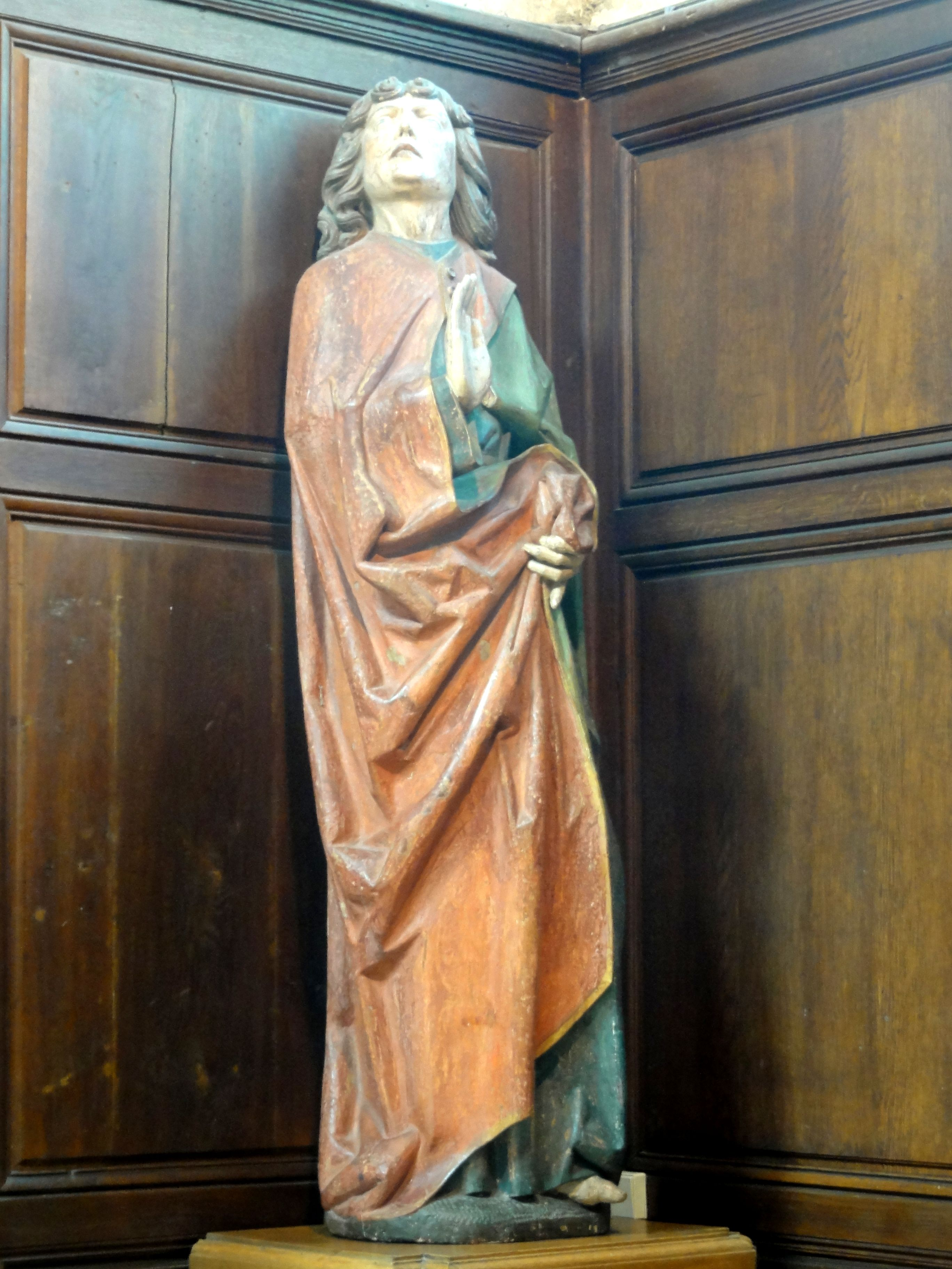 Statue de saint Jean provenant du poutre de gloire.